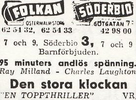 Biografannons för Söderbiograf den 20 november 1948